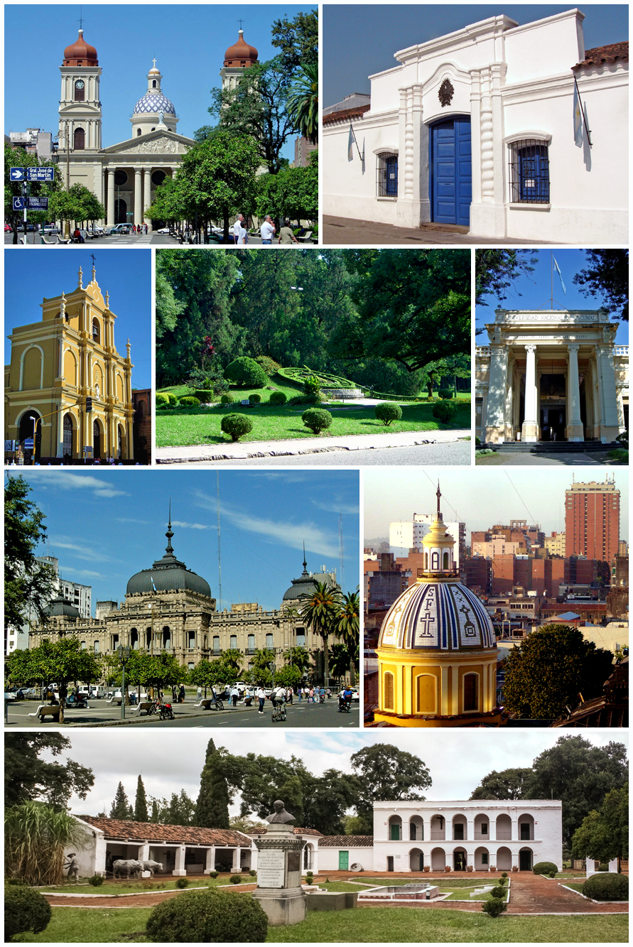 Mosaico fotográfico de la ciudad de San Miguel de Tucumán.